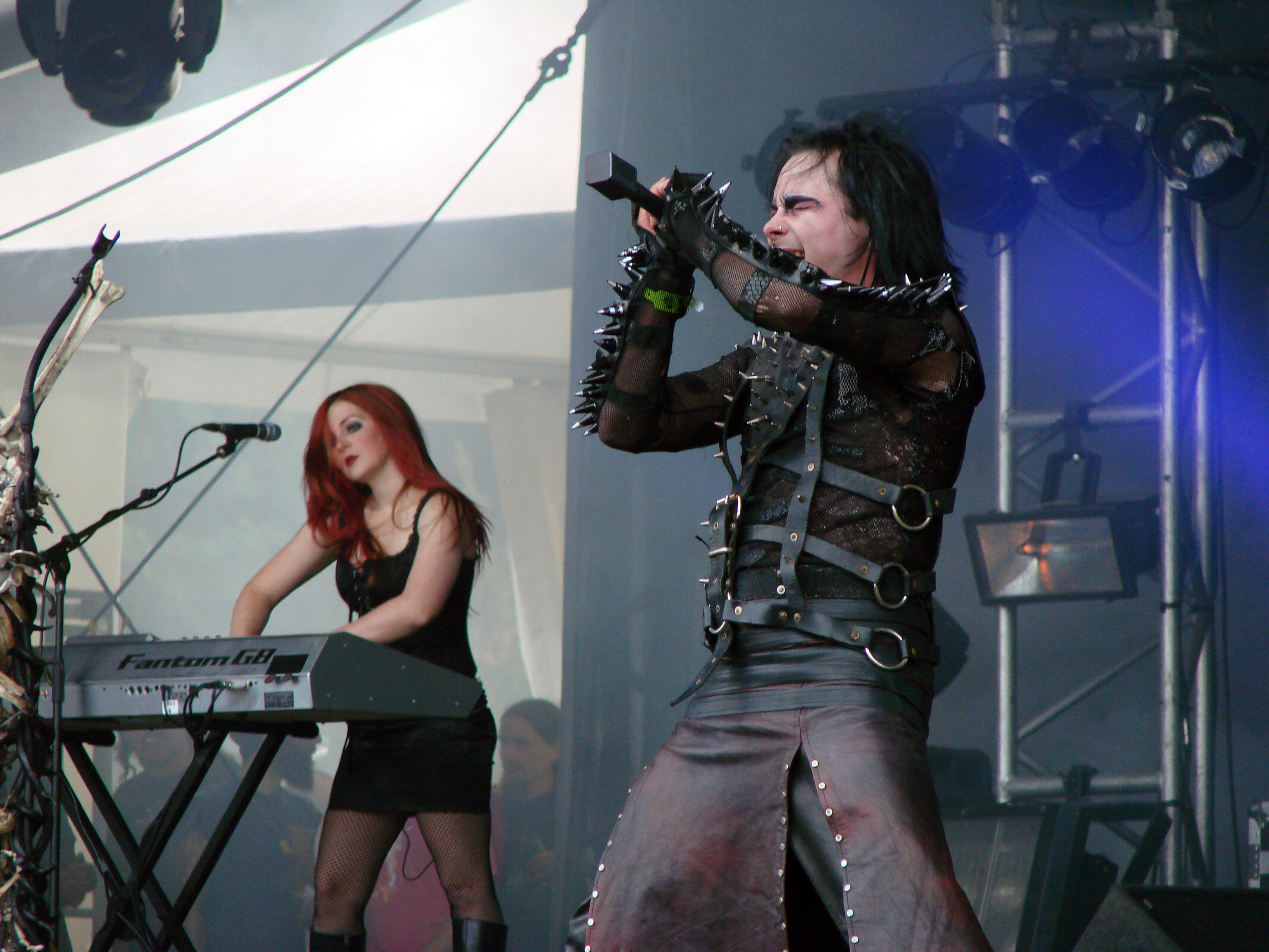 Cradle of Filth au Hellfest 2009.